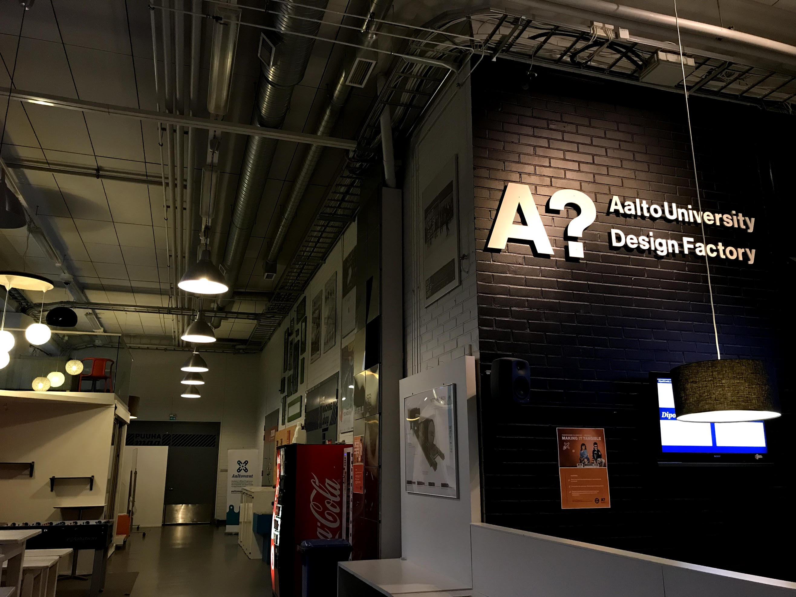 アールト・デザイン・ファクトリー内部の様子。